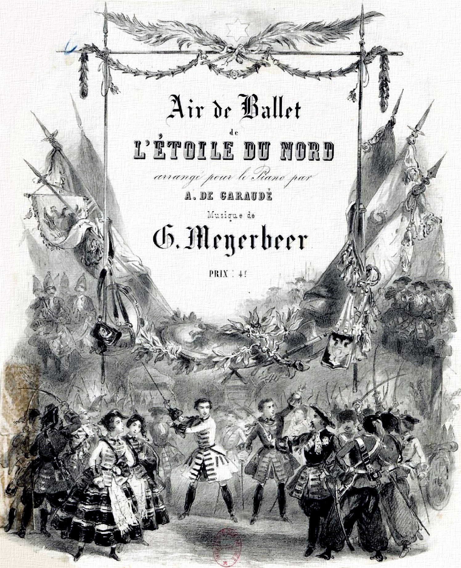 Air de Ballet de l'Etoile du Nord arrangé pour le piano par A. de Garaudé